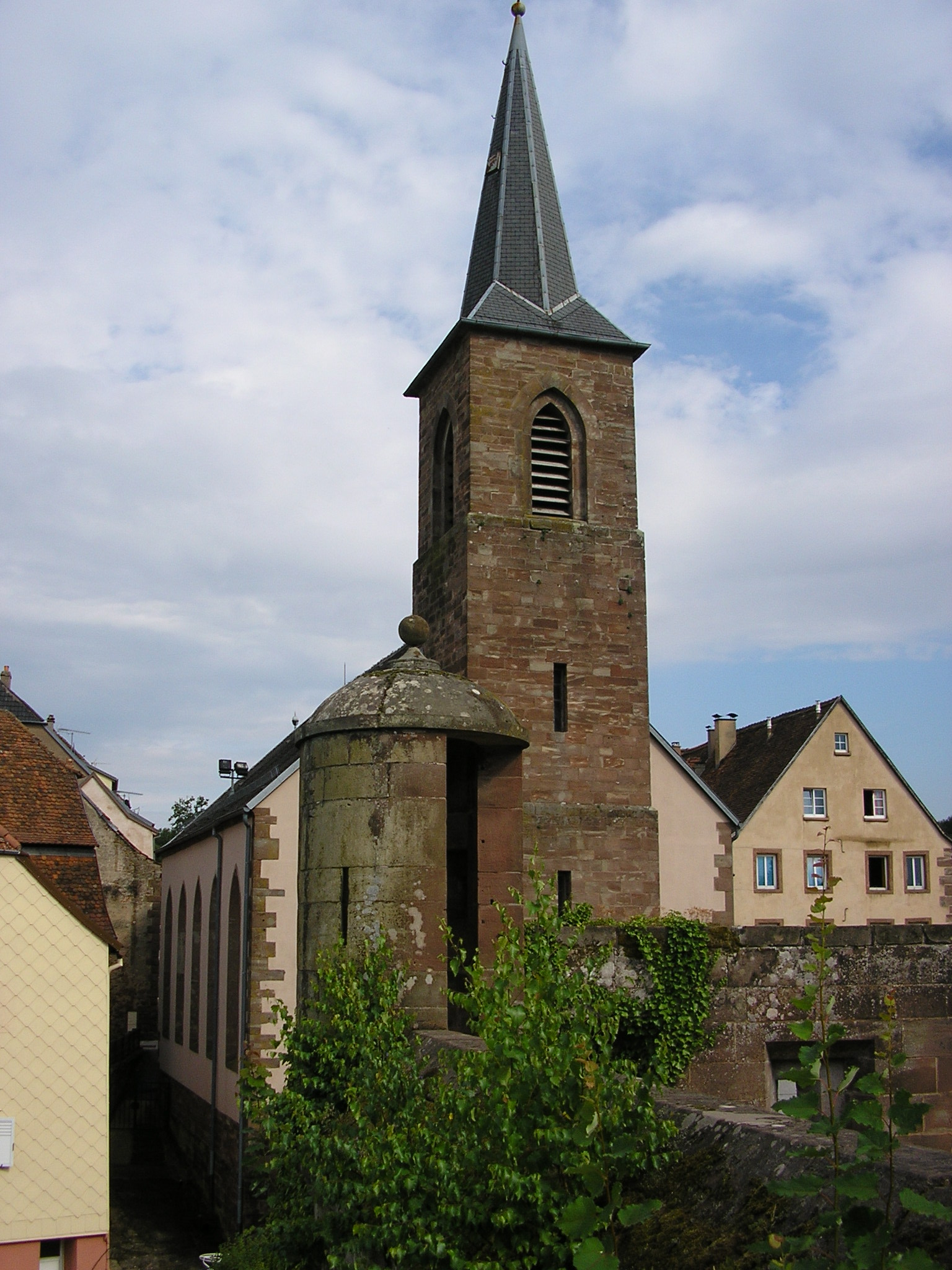 Eglise simultanée de La Petite-Pierre, Bas Rhin